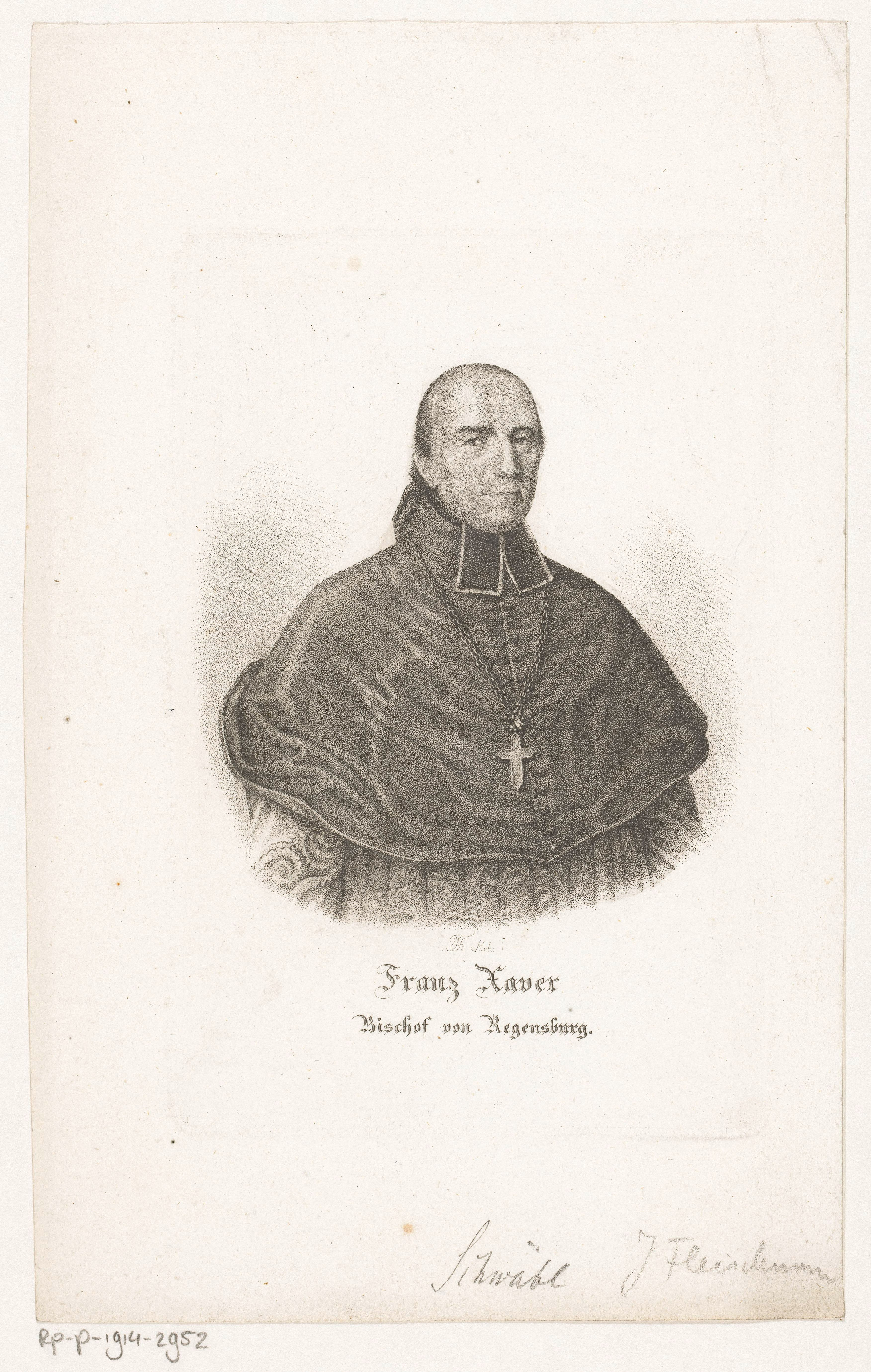 IdentificatieTitel(s): Portret van Franz Xaver van SchwäblObjecttype: prent Objectnummer: RP-P-1914-2952Catalogusreferentie: HAB A 19833Opschriften / Merken: verzamelaarsmerk, verso, gestempeld: Lugt 2228VervaardigingVervaardiger: prentmaker: Friedrich Fleischmann (vermeld op object)Datering: 1801 - 1834Materiaal: papier Techniek: stippelwerk / rouletteAfmetingen: plaatrand: h 152 mm × b 100 mmOnderwerpWat: historical personsarchbishop, bishop, etc. (Roman Catholic)Wie: Franz Xaver van SchwäblVerwerving en rechtenVerwerving: aankoop 1905Copyright: Publiek domein